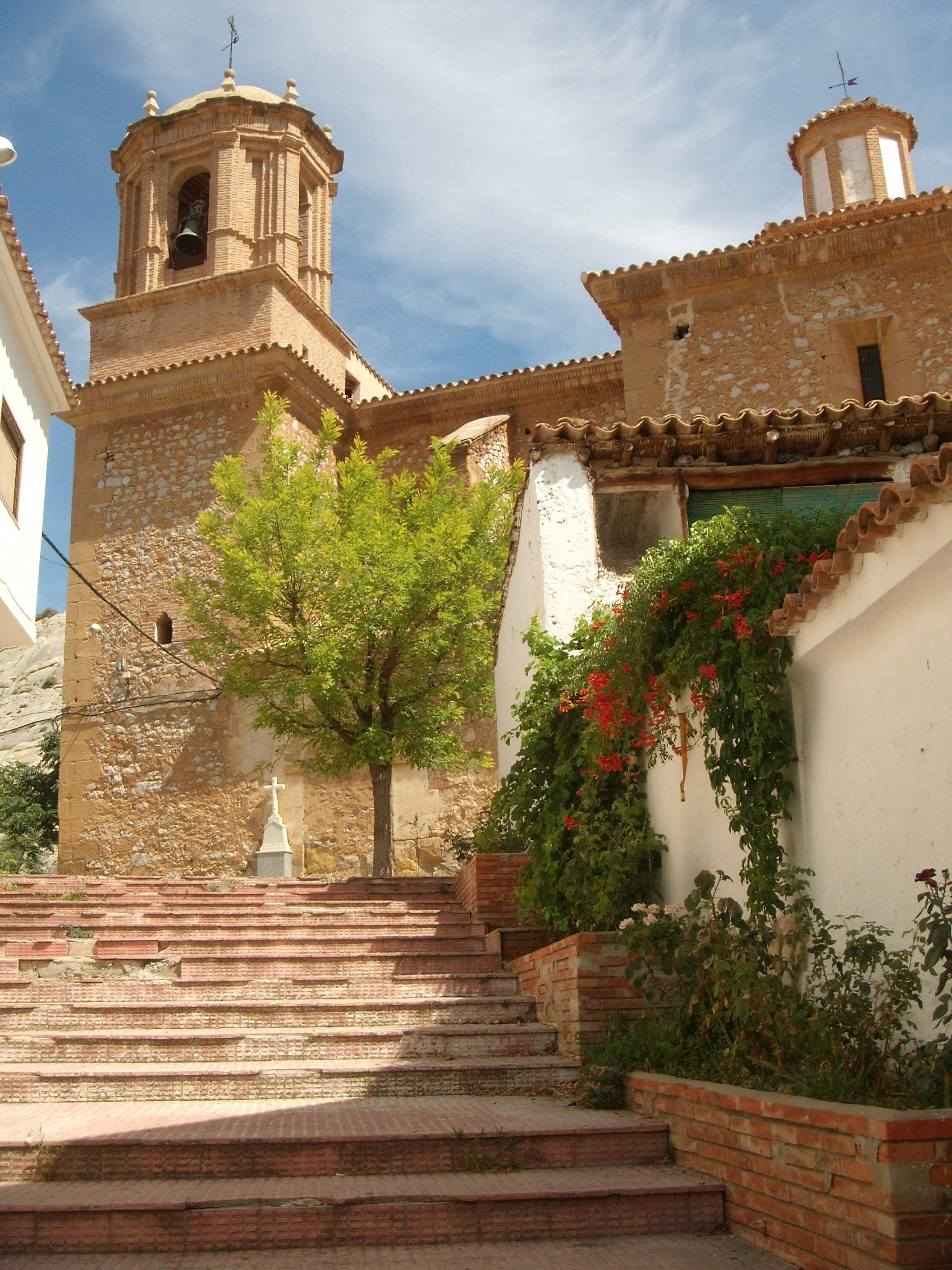 Vista de una calle de Foz-Calanda, con la Iglesia de San Juan Bautista al fondo